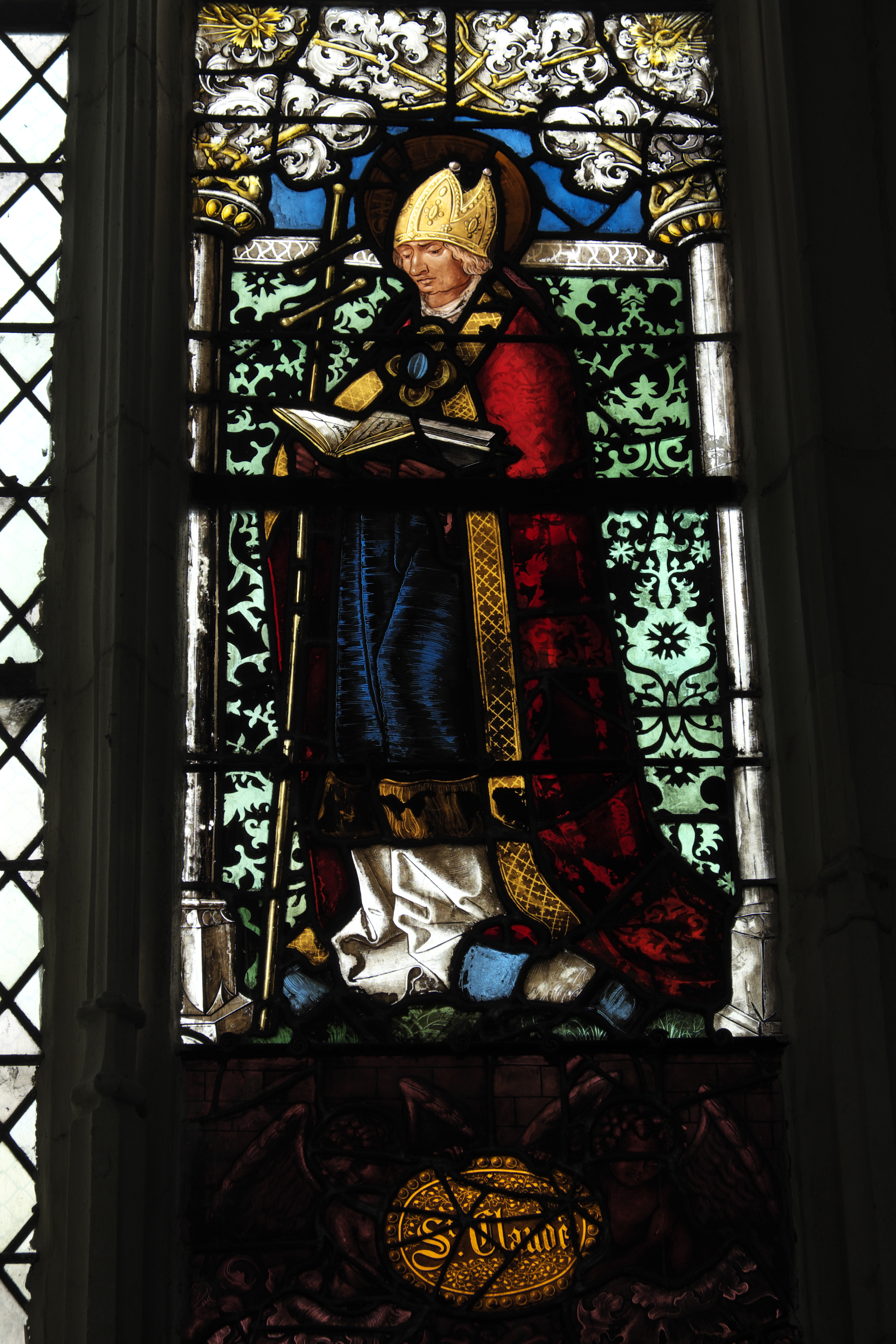 Bleiglasfenster (Baie 22) in der Basilika Saint-Nicolas in Saint-Nicolas-de-Port im Département Meurthe-et-Moselle (Lothringen/Frankreich), von Valentin Bousch (um 1514—1520); Darstellung: Hl. Claudius von Condat